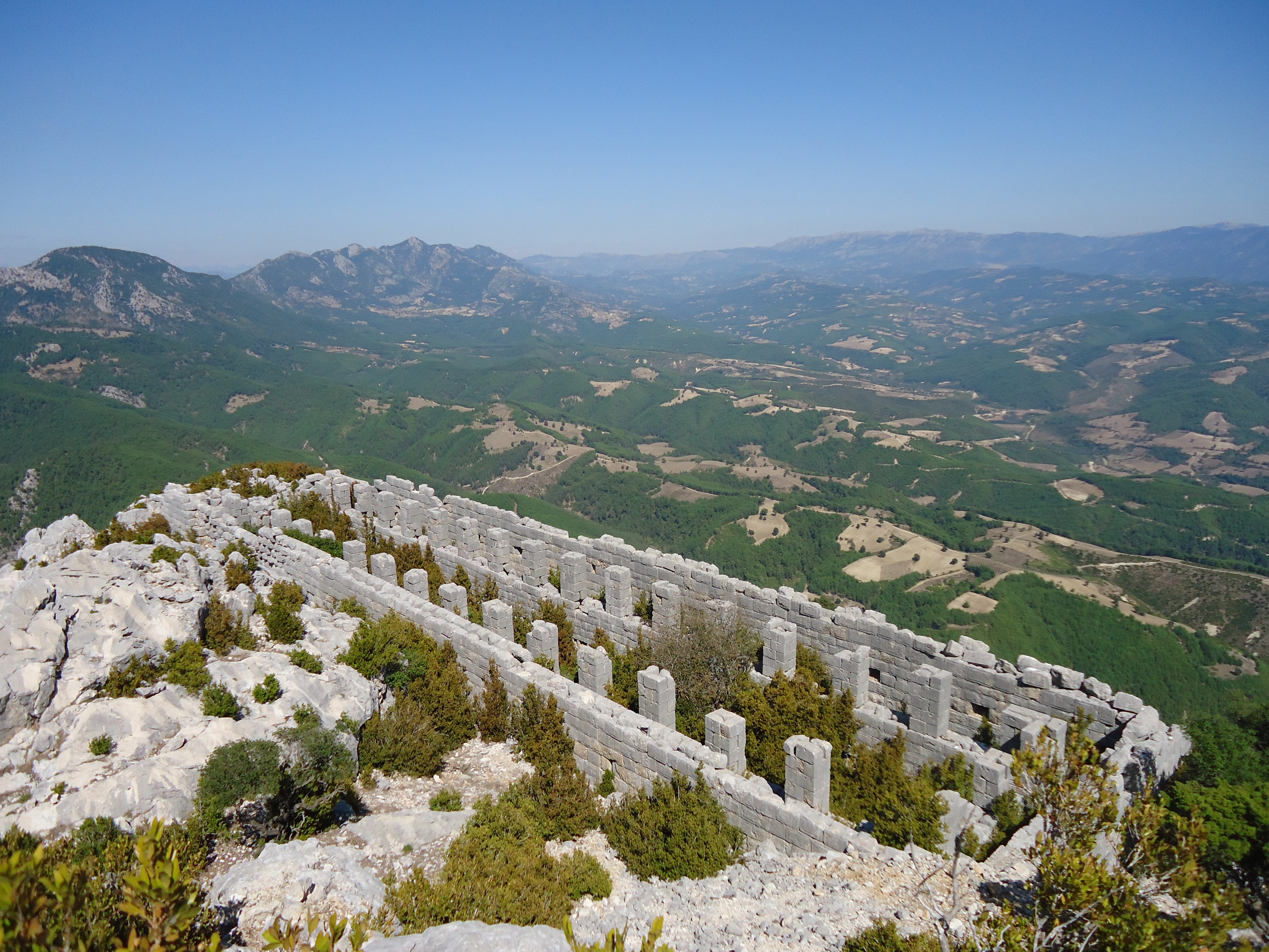 Der Speicher der "Elefantenburg"